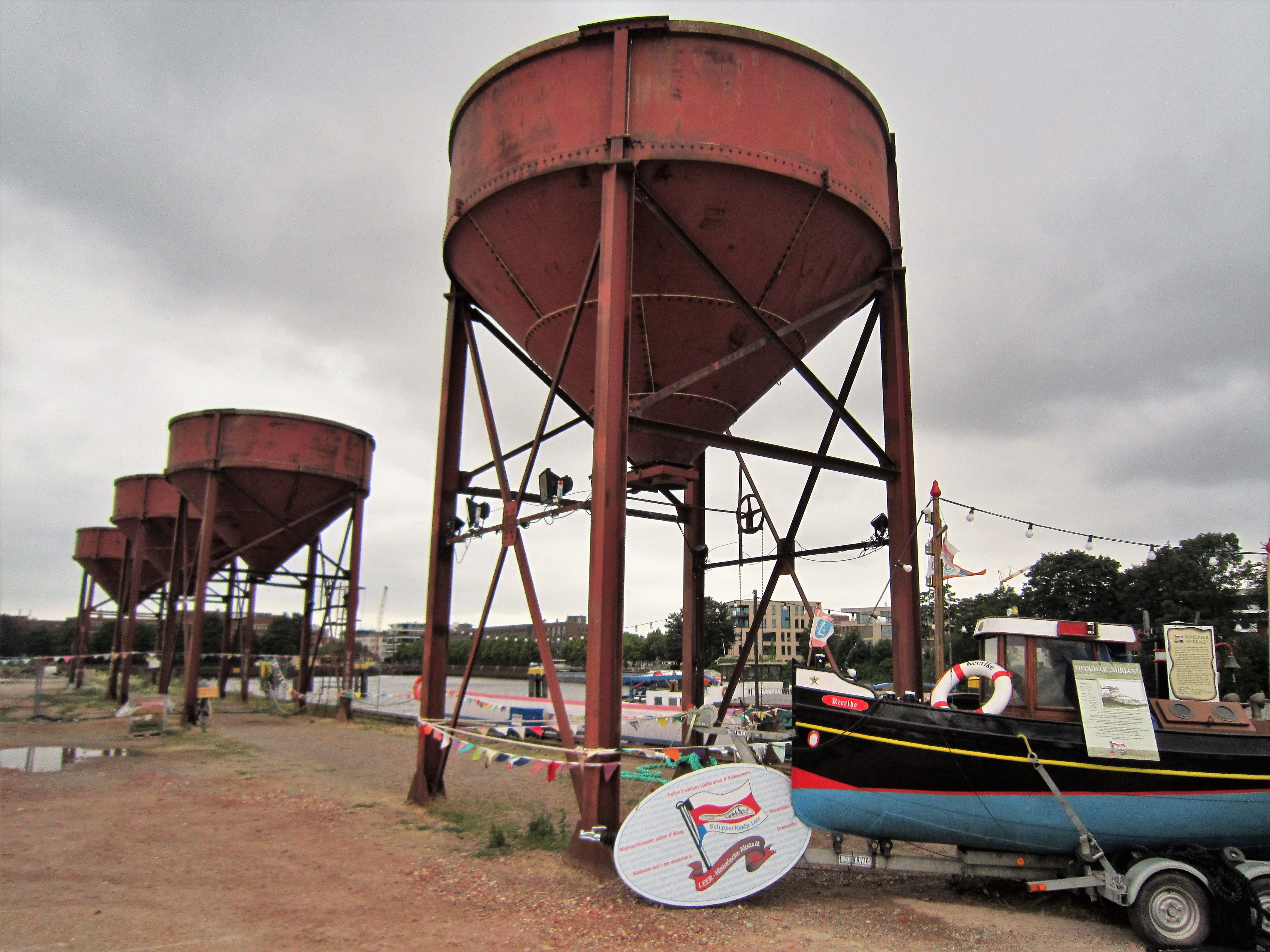 Theaterhafen Oldenburg. Überreste der Firma Rhein-Umschlag (Juni 2018)